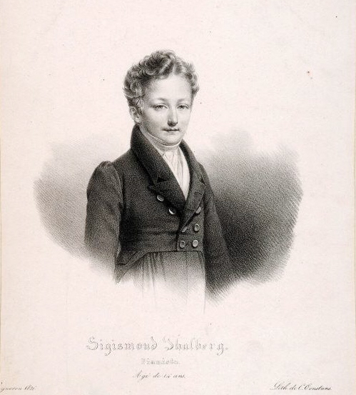 Sigismund Thalberg, pianiste, âgé de 14 ans